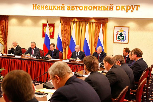 Заседание президиума Государственного совета «О мерах по повышению качества предоставления жилищно-коммунальных услуг населению».